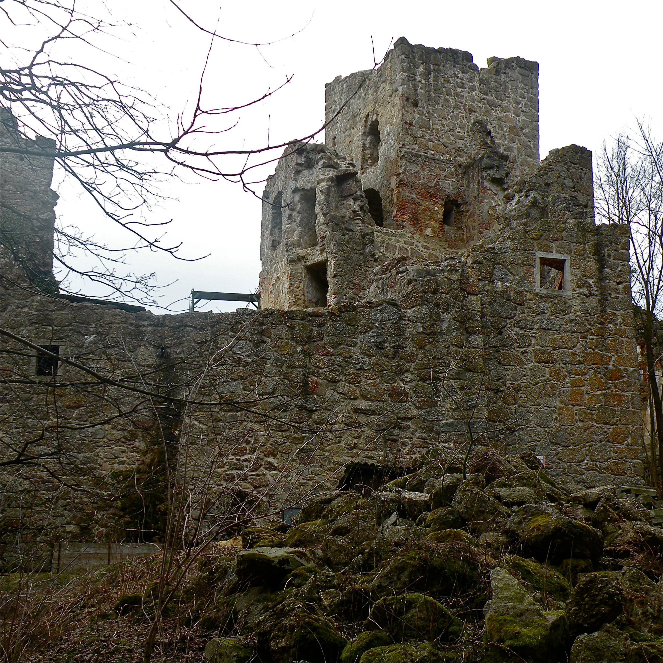 Burgruine Windhaag bei Perg im Bezirk Perg in Oberösterreich.